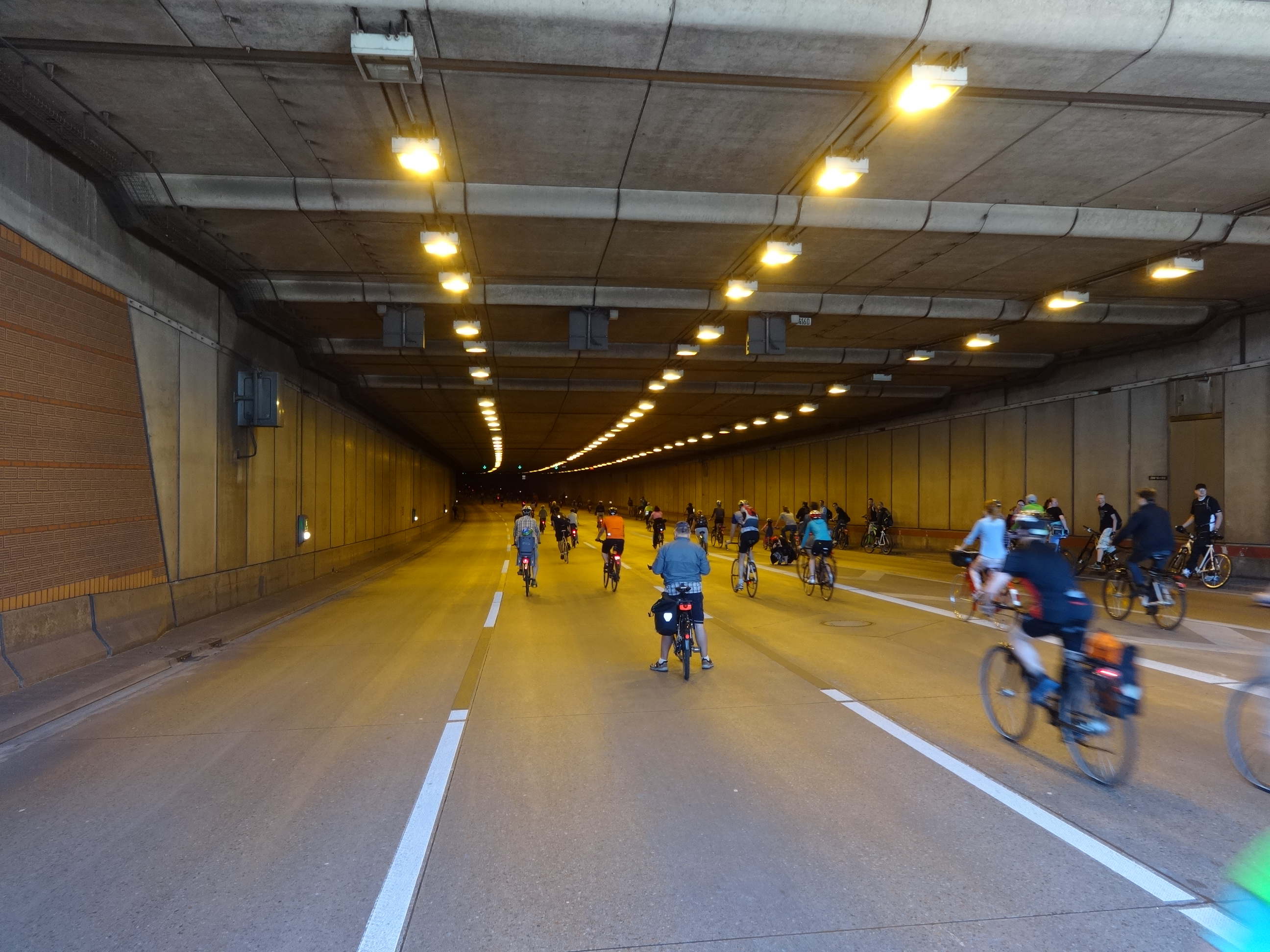 Impression von der Fahrradsternfahrt Berlin 2014, Einfahrt Britzer Tunnel